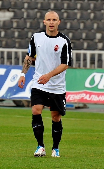 Лукаш Тесак — словацкий футболист.